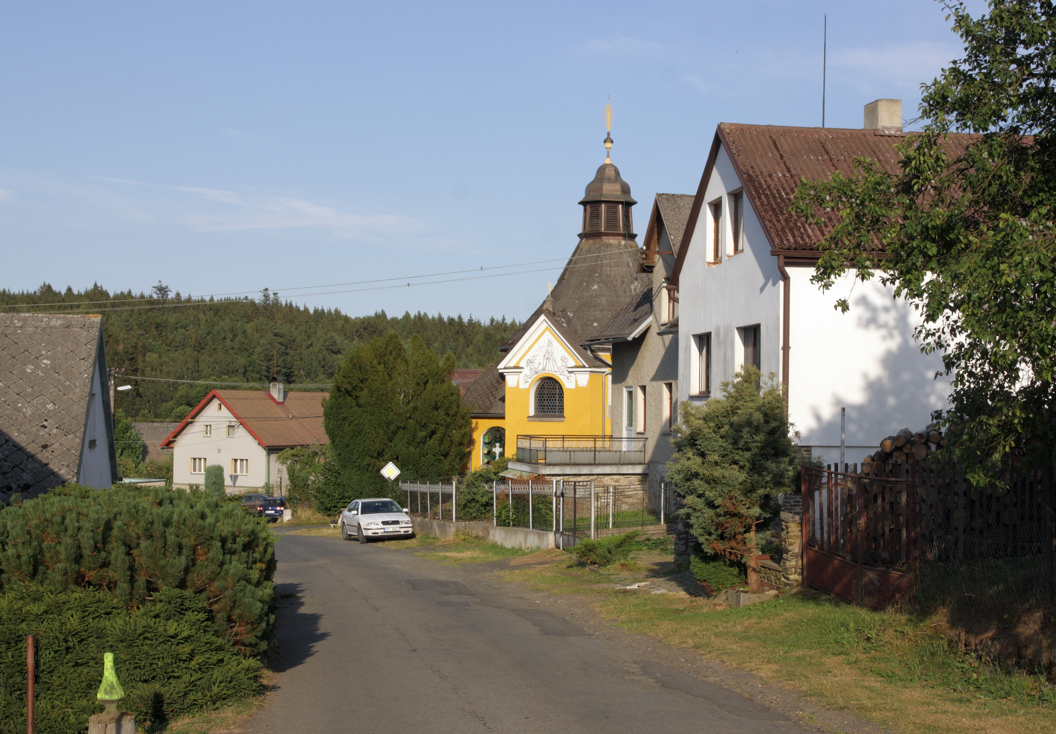 Pec (okres Domažlice) - pohled na kapli od Z.